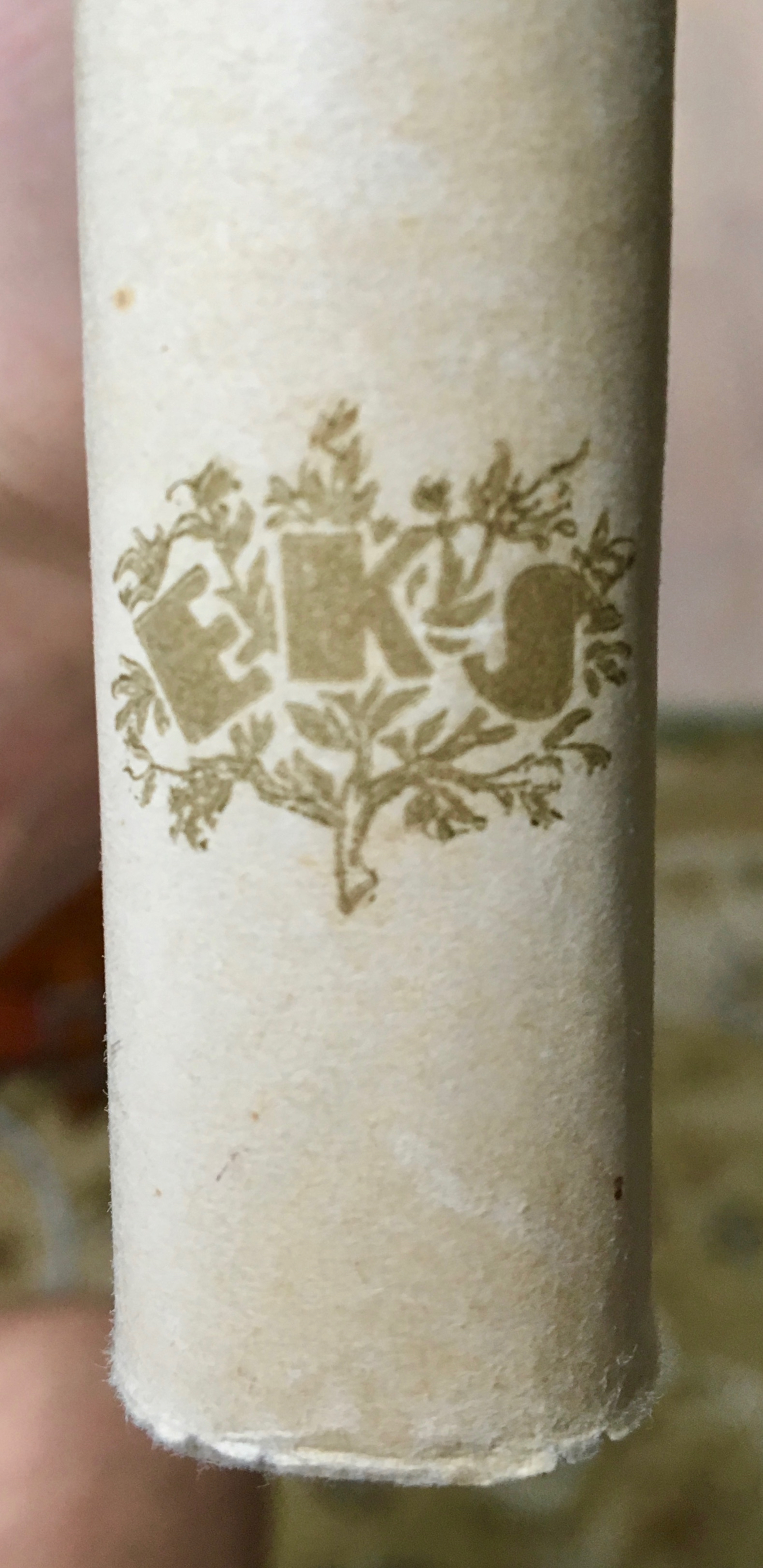 EKS embleem